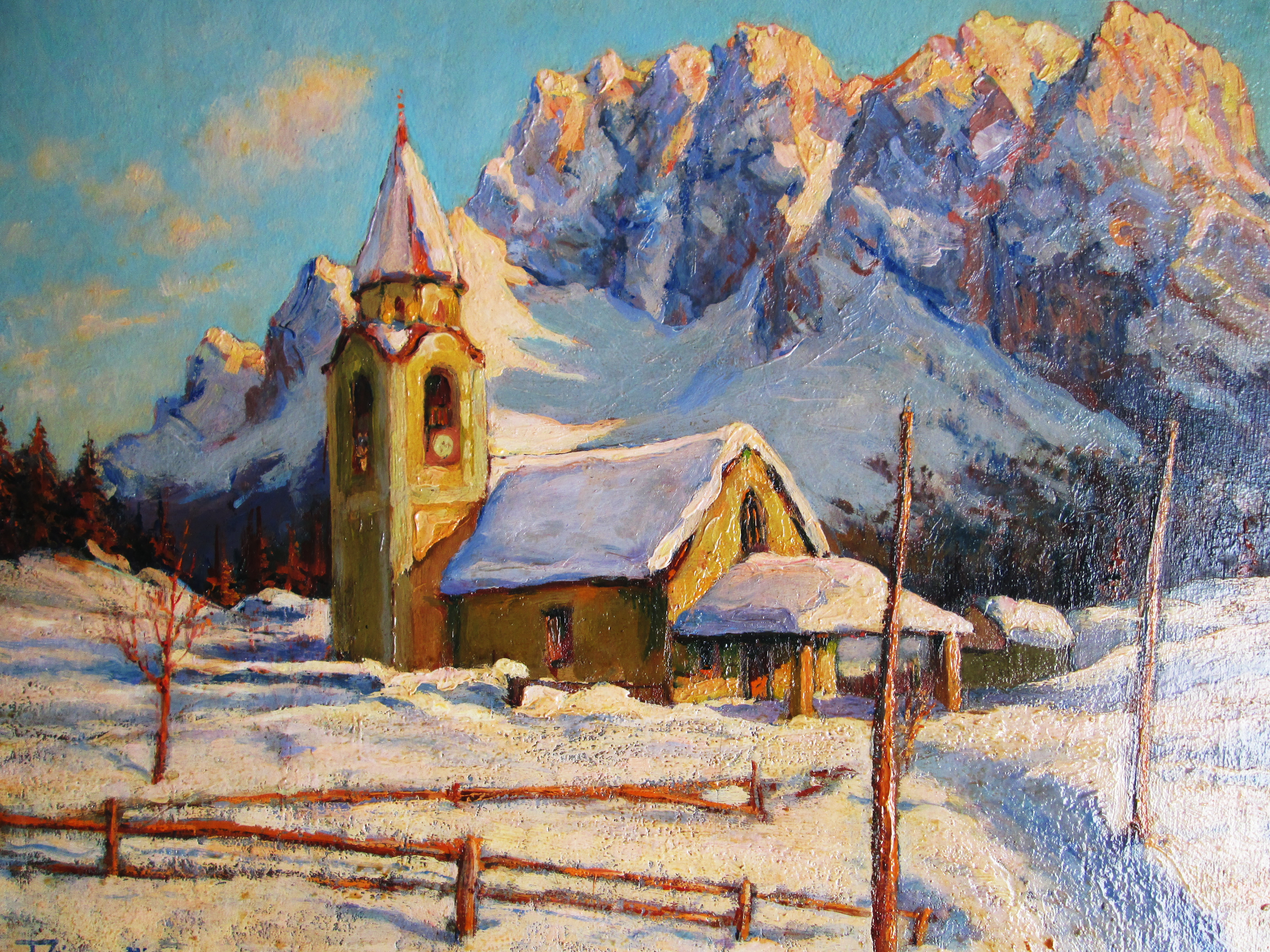 Quadro di Francesco Giancotti (1878-1940), raffigurante la chiesa di Sant'Osvaldo a Cima Sappada. Il quadro è stato presentato alla terza mostra sindacale d'arte provinciale di Belluno.